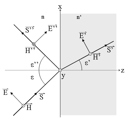 representación de difracción y reflexión. E // al plano de incidencia. Ley de Fresnel. Fresnel Law.